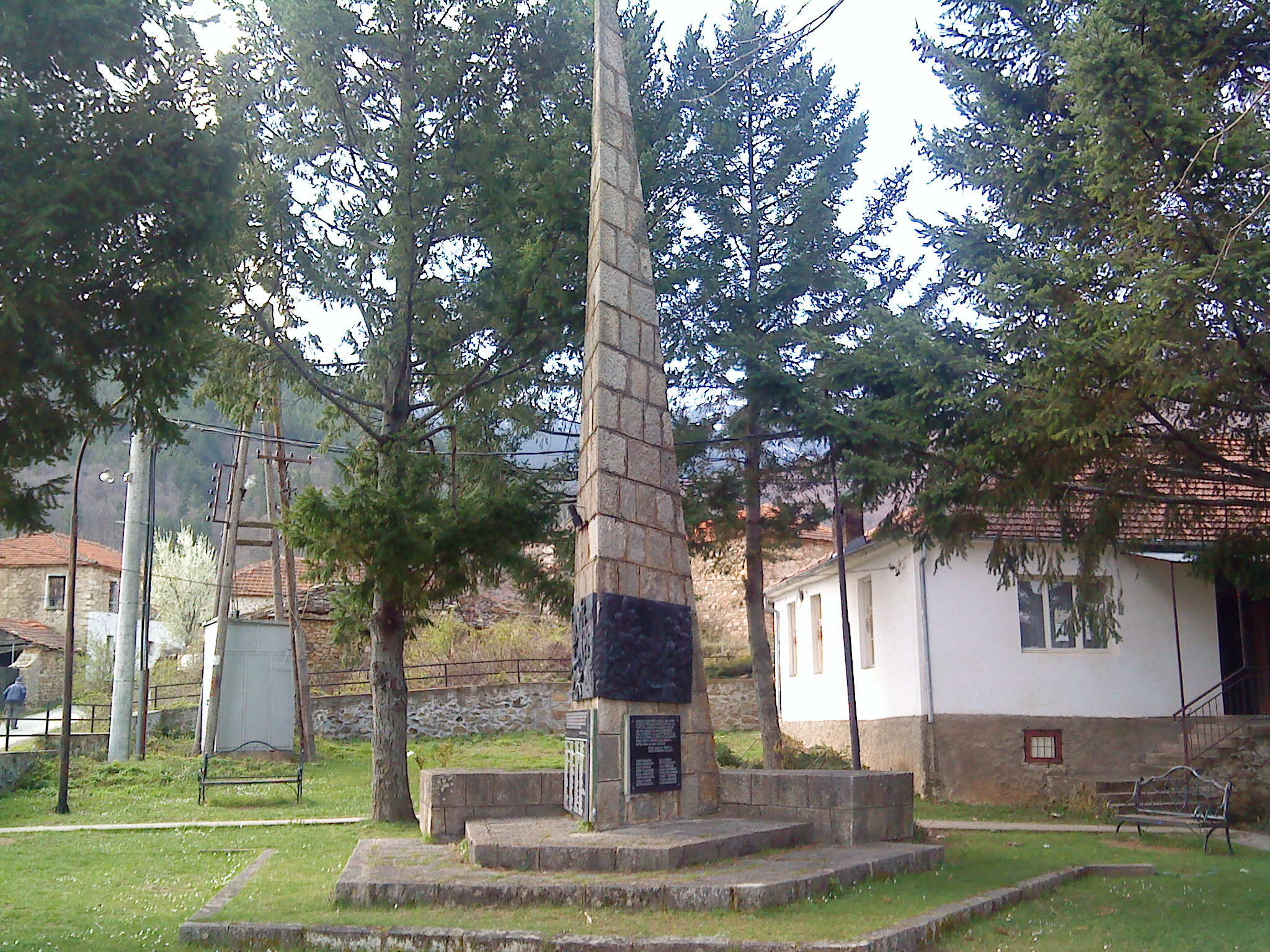 Споменик на паднатите борци од илинденскиот период и НОВ во РМ во с. Цапари